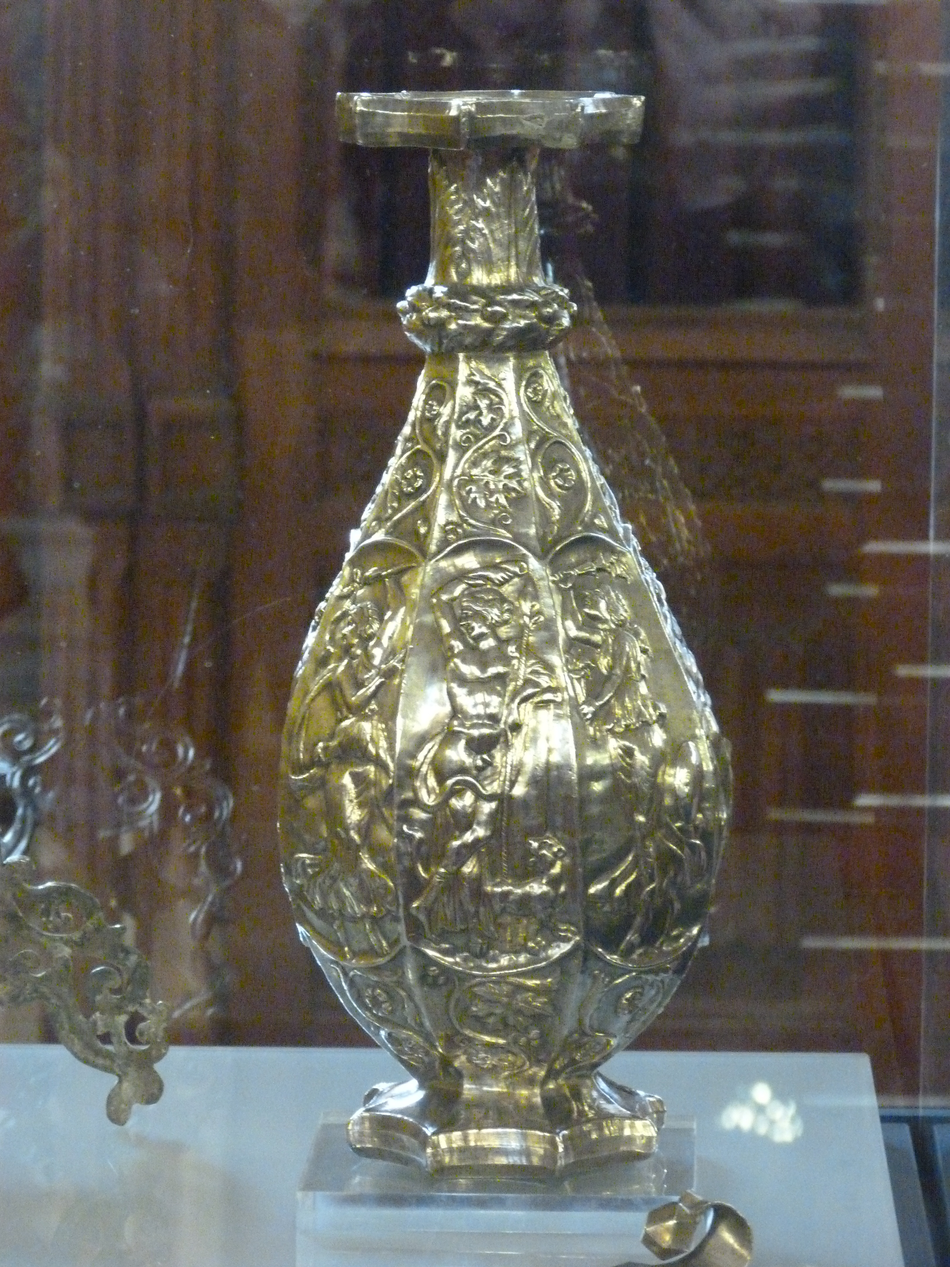 A felvétel 2014. április 2 -án készült Budapesten, az Országházban. 2014. március 26 –án szerdán, rendkívüli sajtótájékoztatón jelentette be Orbán Viktor, hogy Magyarország visszaszerezte és hazaszállította a Seuso kincs hét darabját, mely három hónapon át megtekinthető az Országházban. A Seuso kincs késő császárkori ünnepi lakoma ezüst készlet. Tulajdonosa, Seuso a 4. század végén, 5. század elején rejthette el a Polgárdi szőlőhegyen. Ez a terület a Balatonnal határos volt abban az időben. A ma ismert és fennmaradt, késő császárkori kincsleletek közül ez a legértékesebb. Seuso tál, tisztálkodáshoz használt edények. Baán László. Források: A Seuso-kincs darabjait is rejtheti az otthoni családi ezüst - See more at: ©© Derzsi Elekes Andor, Budapest, 2014, A kép és filmfelvételek egészben, vagy részletekben másolását, bármilyen úton történő sokszorosítását és felhasználását a szerző ellenérték nélkül, jogutódjaira is kihatóan megengedi. Az engedély kiterjed a kereskedelmi célú hasznosításra is. Kéri azonban nevének feltüntetését a felhasználás során. A Metapolisz sorozat valamennyi képe és filmje Creative Commons alatti valamint kereskedelmi - for profit - célra is felhasználható. Ajánlott hivatkozás: Derzsi Elekes Andor: Metapolisz DVD line